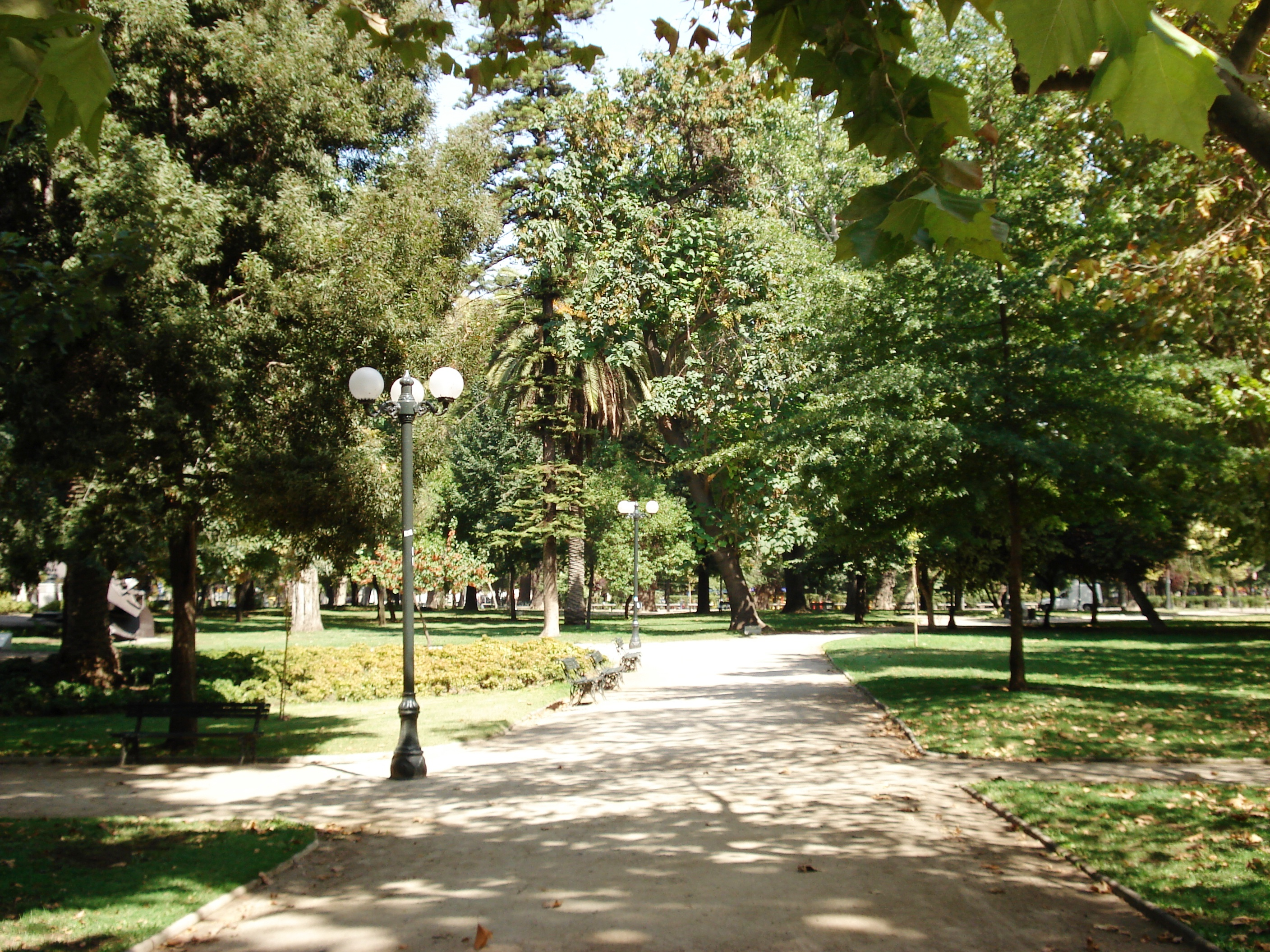 Vista del Parque Forestal de la ciudad de Santiago de Chile.